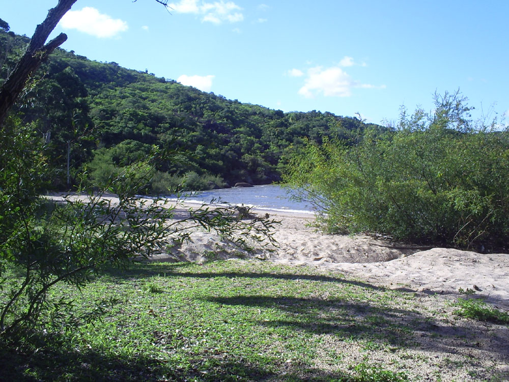 Reserva Estadual de Itapuã